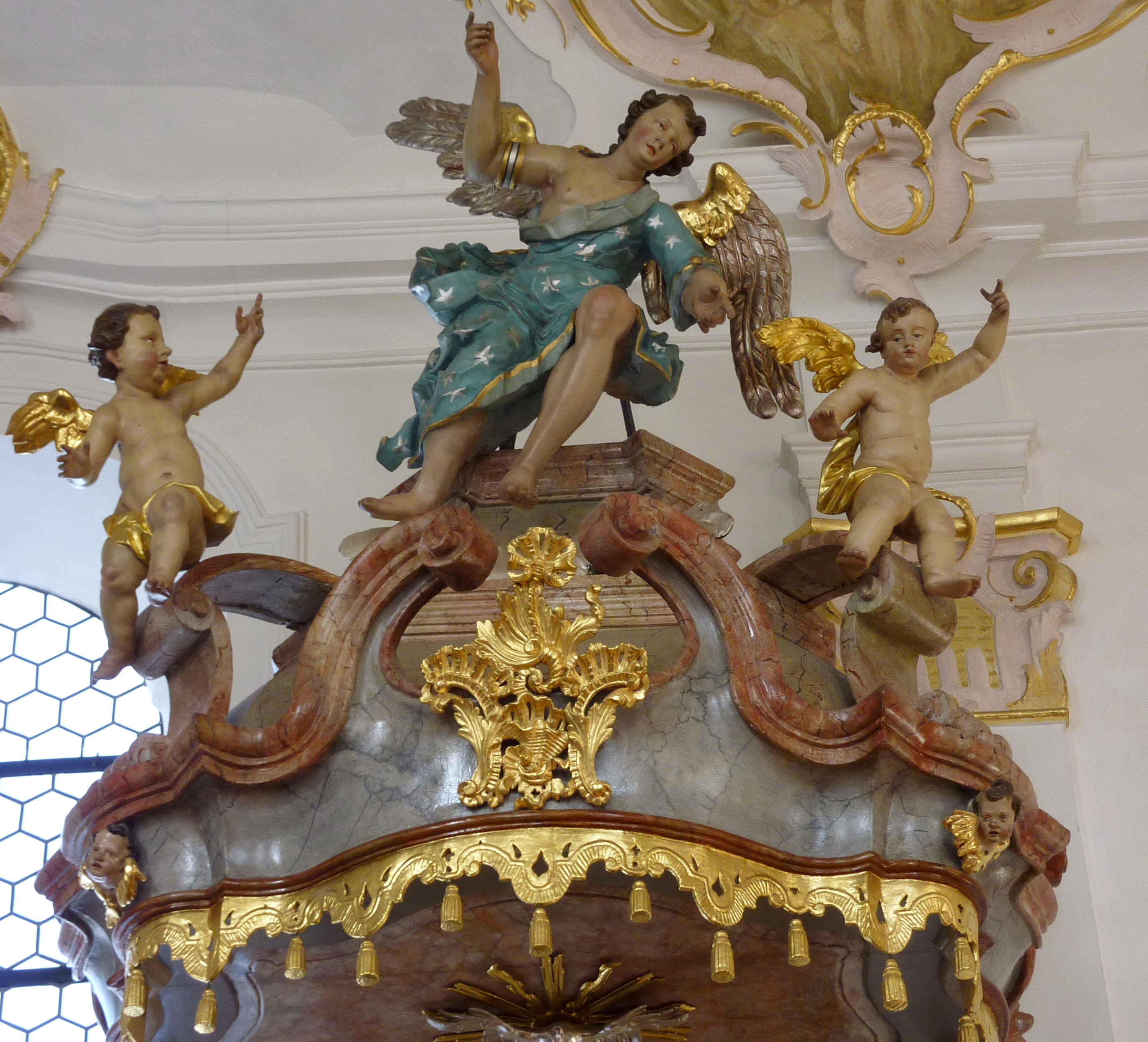 Katholische Pfarrkirche St. Michael in Oberbechingen, einem Ortsteil der Gemeinde Bachhagel im Landkreis Dillingen an der Donau (Bayern), Kanzel um 1760, von Franz Karl Schwertle, Schalldeckel